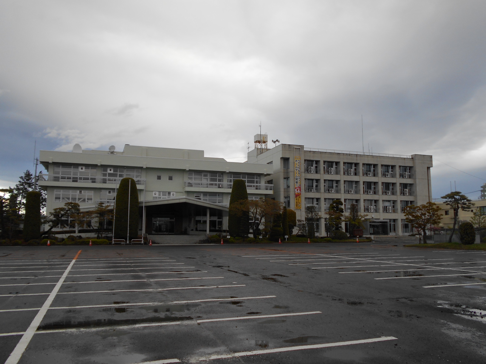 宮城県角田市役所